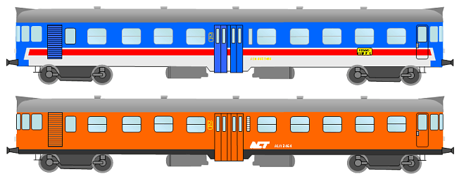 ALn 668 ACT Reggio Emilia (autore Marco Lambruschi)